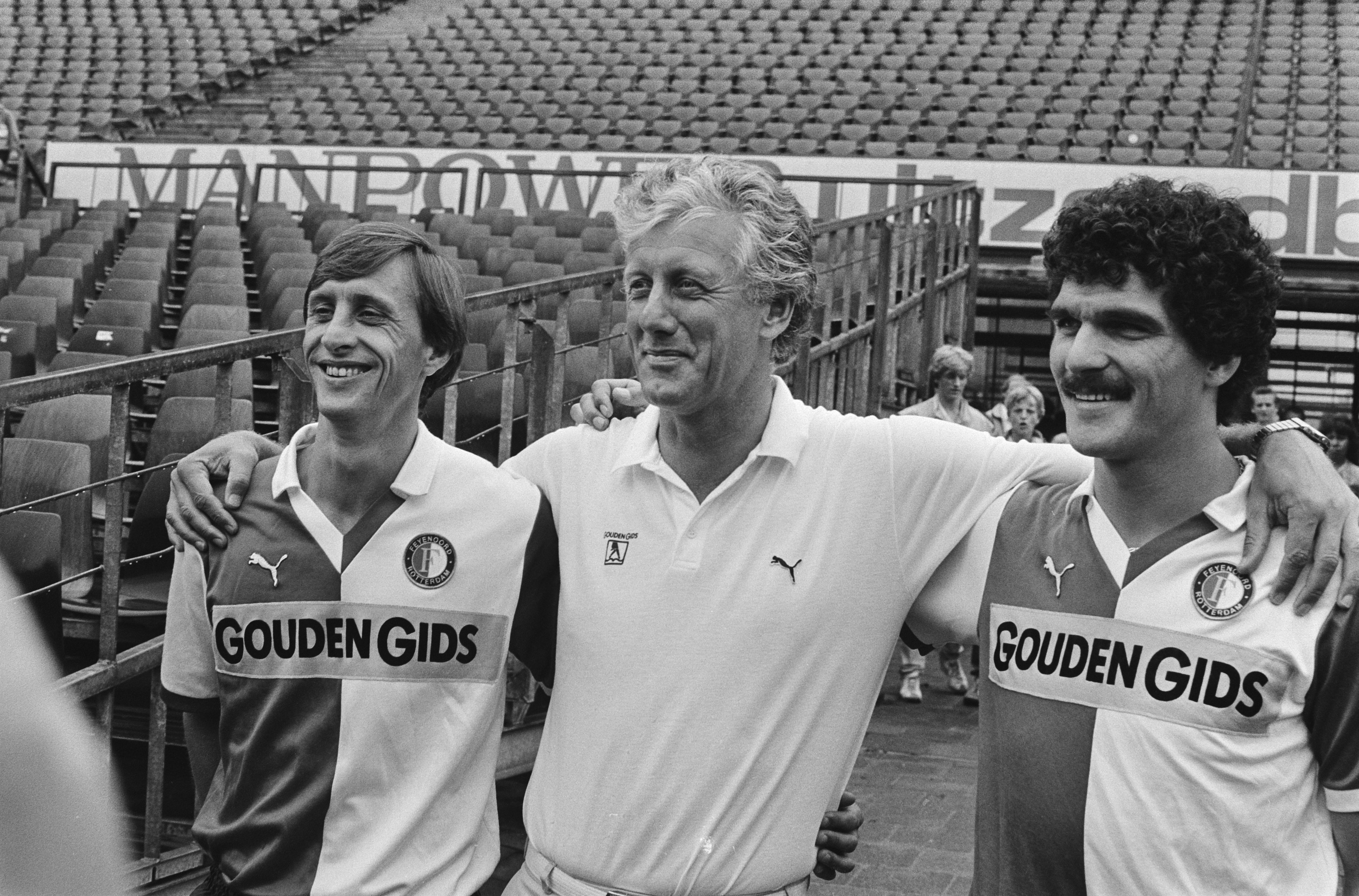 Collectie / Archief : Fotocollectie Anefo Reportage / Serie : Feyenoord Beschrijving : V.l.n.r. dhr. Johan Cruijff , trainer Thijs Libregts en dhr. Michel van de Korput Datum : 1 augustus 1983 Locatie : Rotterdam, Zuid-Holland Trefwoorden : trainers, voetbal Persoonsnaam : Cruijff, Johan, Korput, Michel van de, Libregts, Thijs Instellingsnaam : Feyenoord Fotograaf : Bogaerts, Rob / Anefo Auteursrechthebbende : Nationaal Archief Materiaalsoort : Negatief (zwart/wit) Nummer archiefinventaris : bekijk toegang 2.24.01.05 Bestanddeelnummer : 932-6601